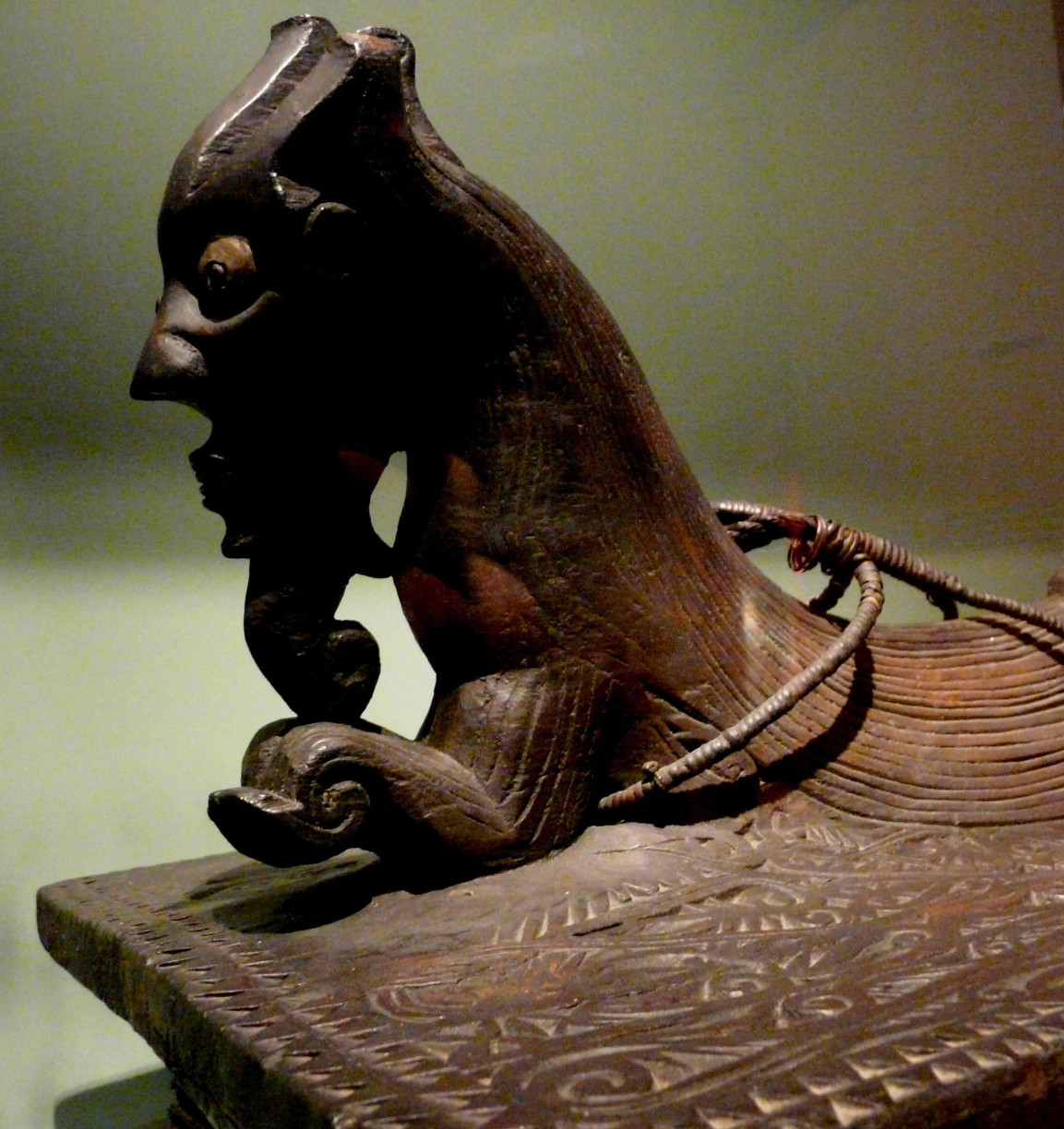 Batak Wichelboek En Toverstaven (A-1389) hout, boombast. Toba - Batak (volk), Noord Sumatra, Indonesië. ca.1850. Een van de oudste Batak wichelboeken. De tekst is geschreven op boombast bladeren en gaat over magie en waarzeggerij. Het dier bovenop is waarschijnlijk Naga Padoha, de mythische vrouwelijke slang uit de oerwateren. Haar bewegingen brachten aarde naar het wateroppervlak en zo ontstond de wereld. One of the eldest Batak books used for augury and sorcery. The text is written on treebark and is about sorcery and fortune-telling. The animal on top is probably Naga Padoha, the mythical female snake from the ancient waters. Her movements brought the earth to the surface of the water and thus the world came into being. Foto gemaakt tijdens Wiki Loves Art Nederland workshop in het Tropenmuseum in Amsterdam op 26 juni 2009. Photo taken at Wiki Loves Art Netherlands workshop in the Tropenmuseum in Amsterdam on 26 June 2009.